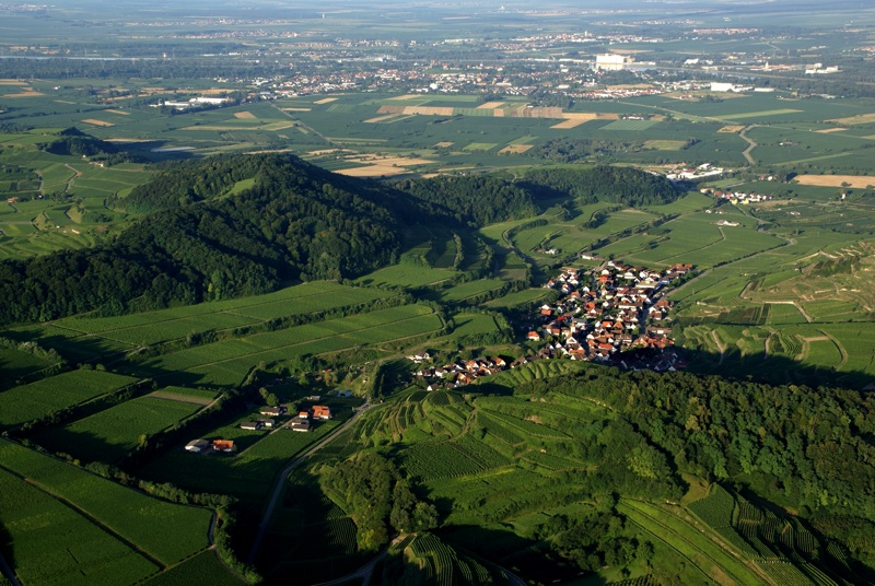 Achkarren im Kaiserstuhl, von Osten her aufgenommen. Im Hintergrund ist Breisach zu sehen.